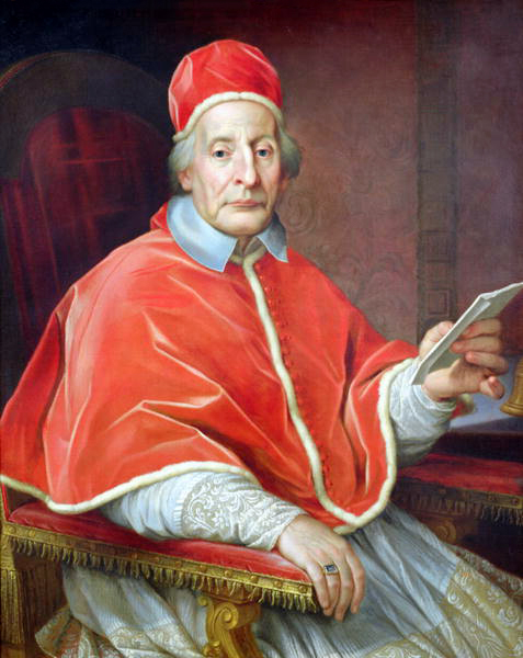 Portrait of Pope Clement XII (1652-1740)